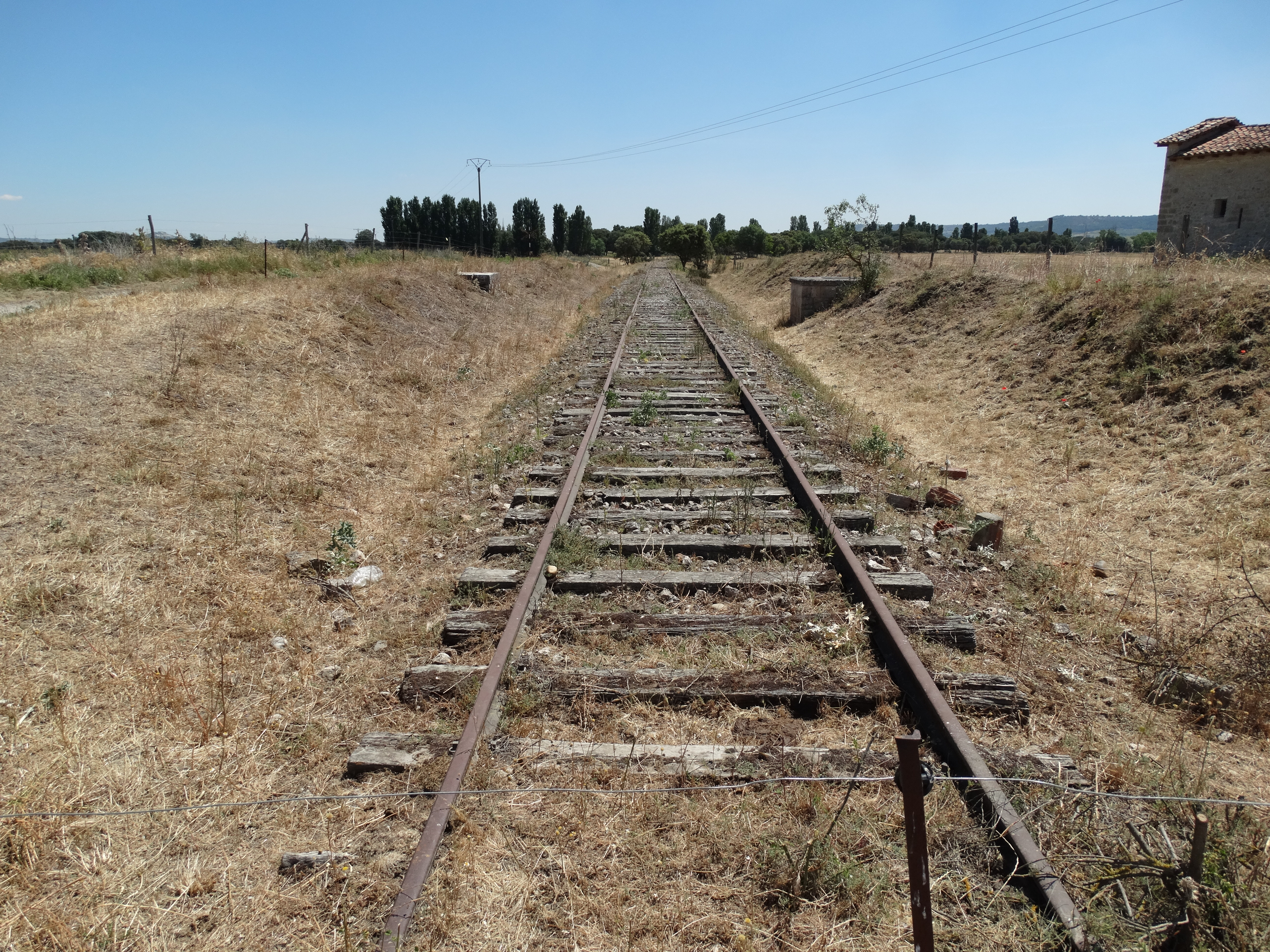 Valladolid, España. Vía del ferrocarril Valladolid-Ariza, que pasaba por Fuentes de Duero. Ya está obsoleta.